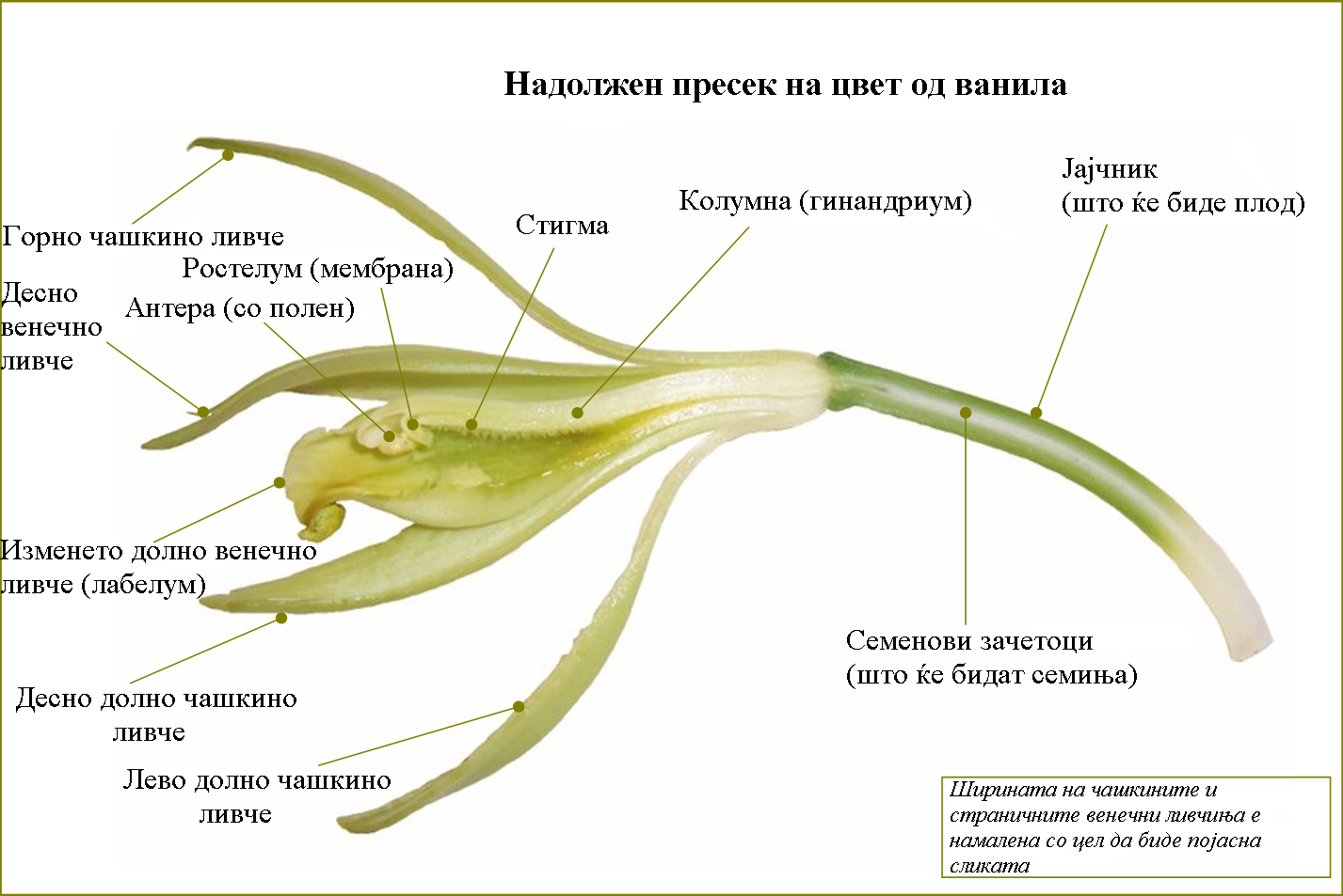 Надолжен пресек на цвет од ванила.